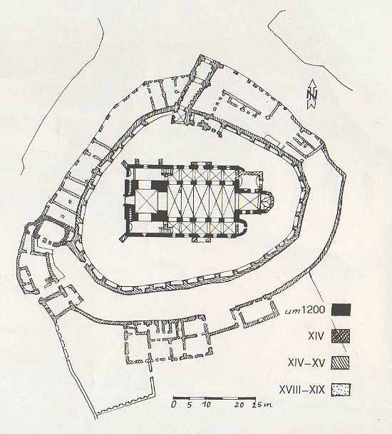 Planul bisericii evanghelice din Cisnadie.